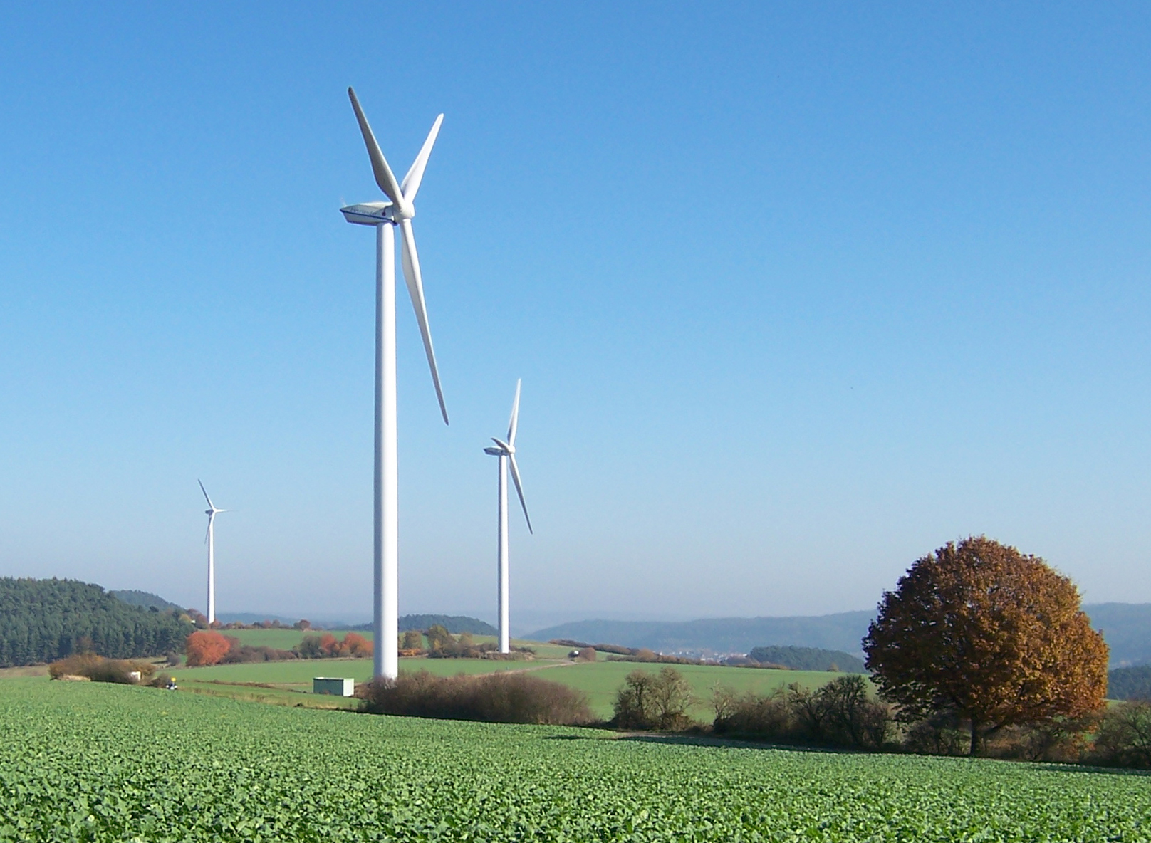 Wind turbines in Marburg-Wehrda (D)